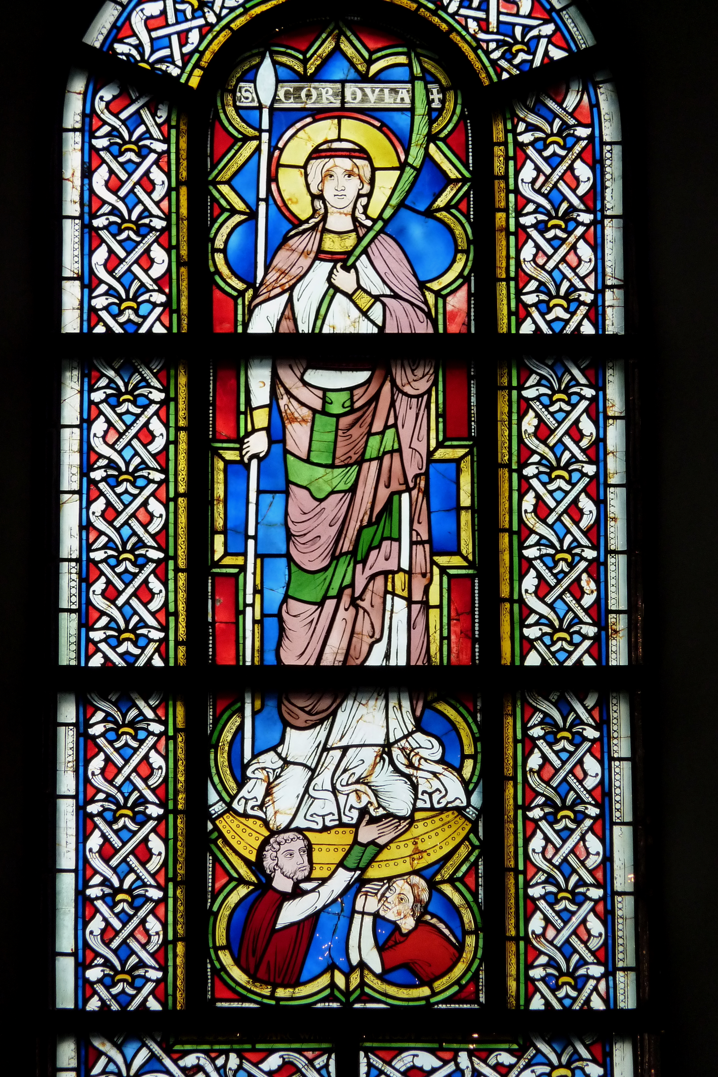 Bleiglasfenster (linkes unteres Apsisfenster) in der katholischen Pfarrkirche St. Kunibert in Köln, Darstellung: hl. Cordula (siehe Werner Schäfke: Kölns romanische Kirchen: Architektur, Kunst, Geschichte, Emons, Köln 2004, S. 115ff., ISBN 3897053217)